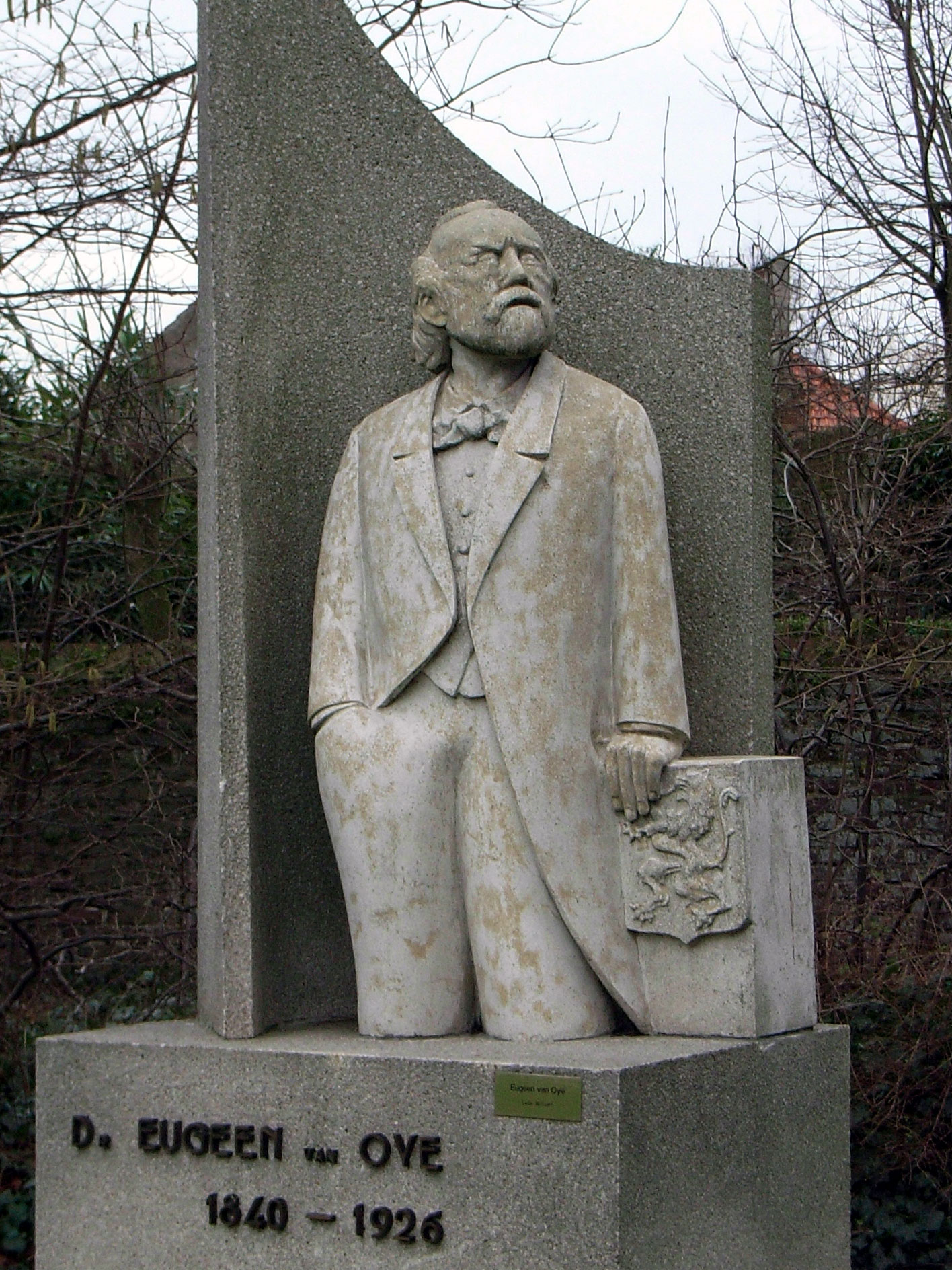 Statue of Eugeen van Oye by Lode Willaert in Gistel, Belgium.